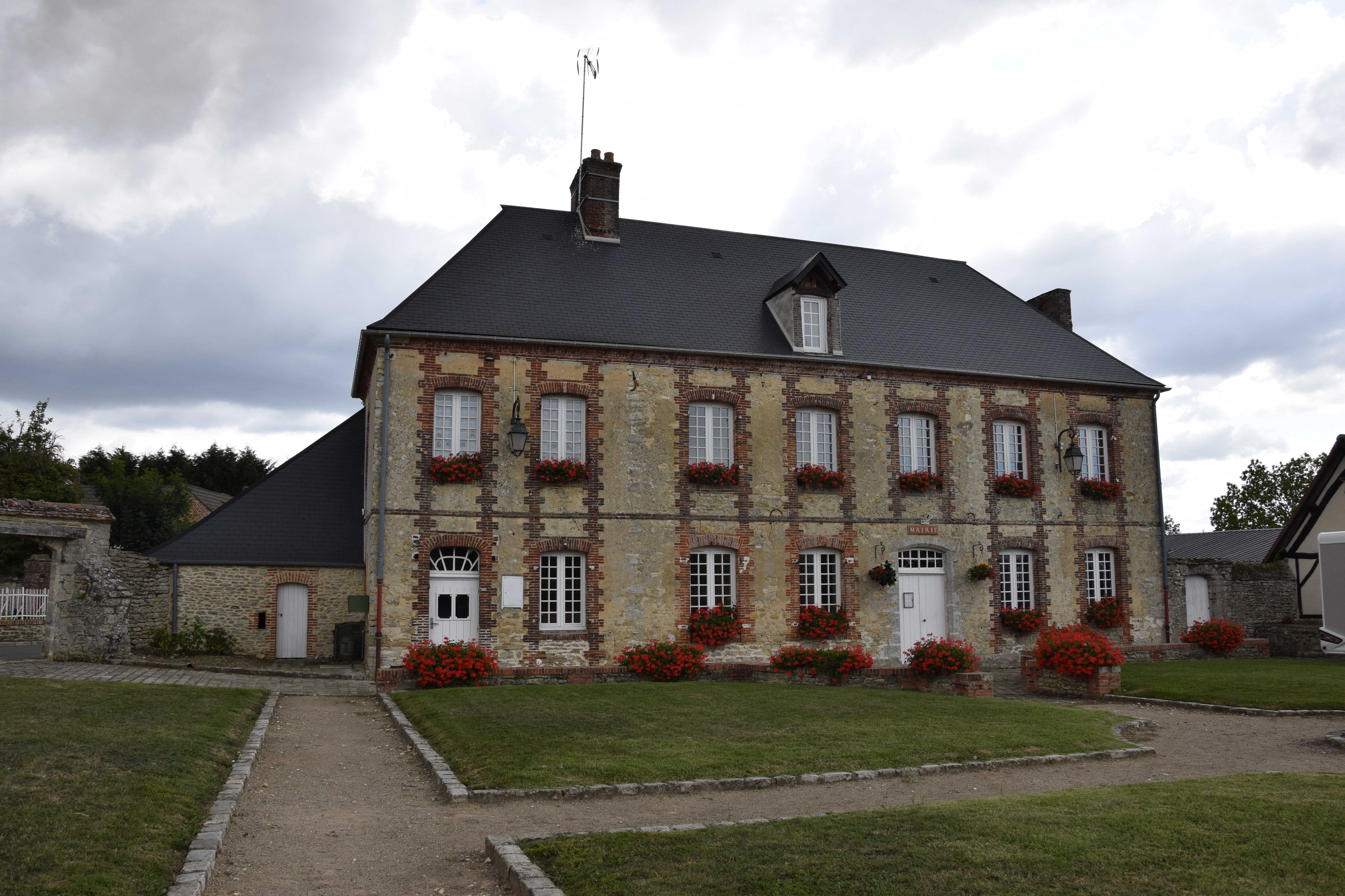 Saint-Quentin-des-Prés mairie